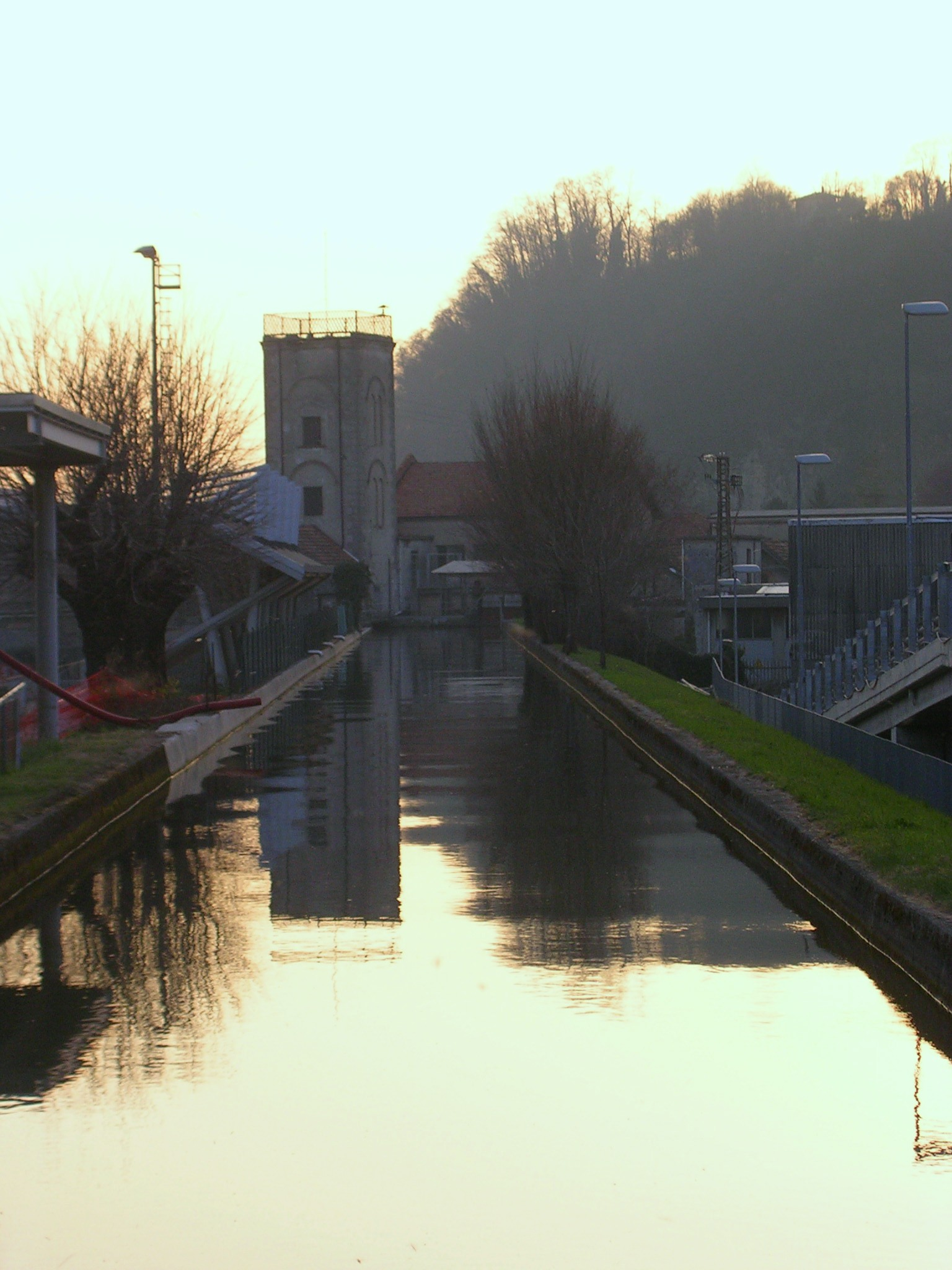 La roggia Serio Grande ad Albino (Bergamo), a monte dell'industria Honegger